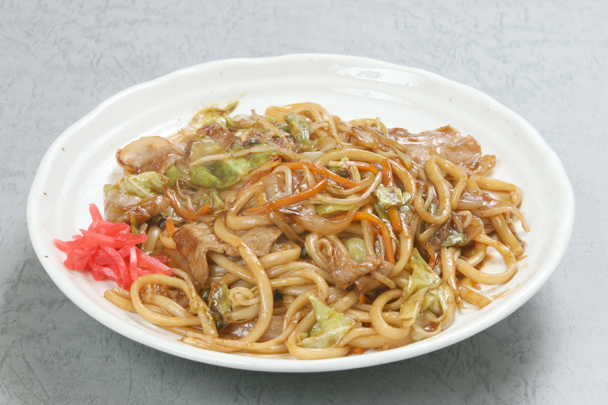 小倉発祥焼うどん